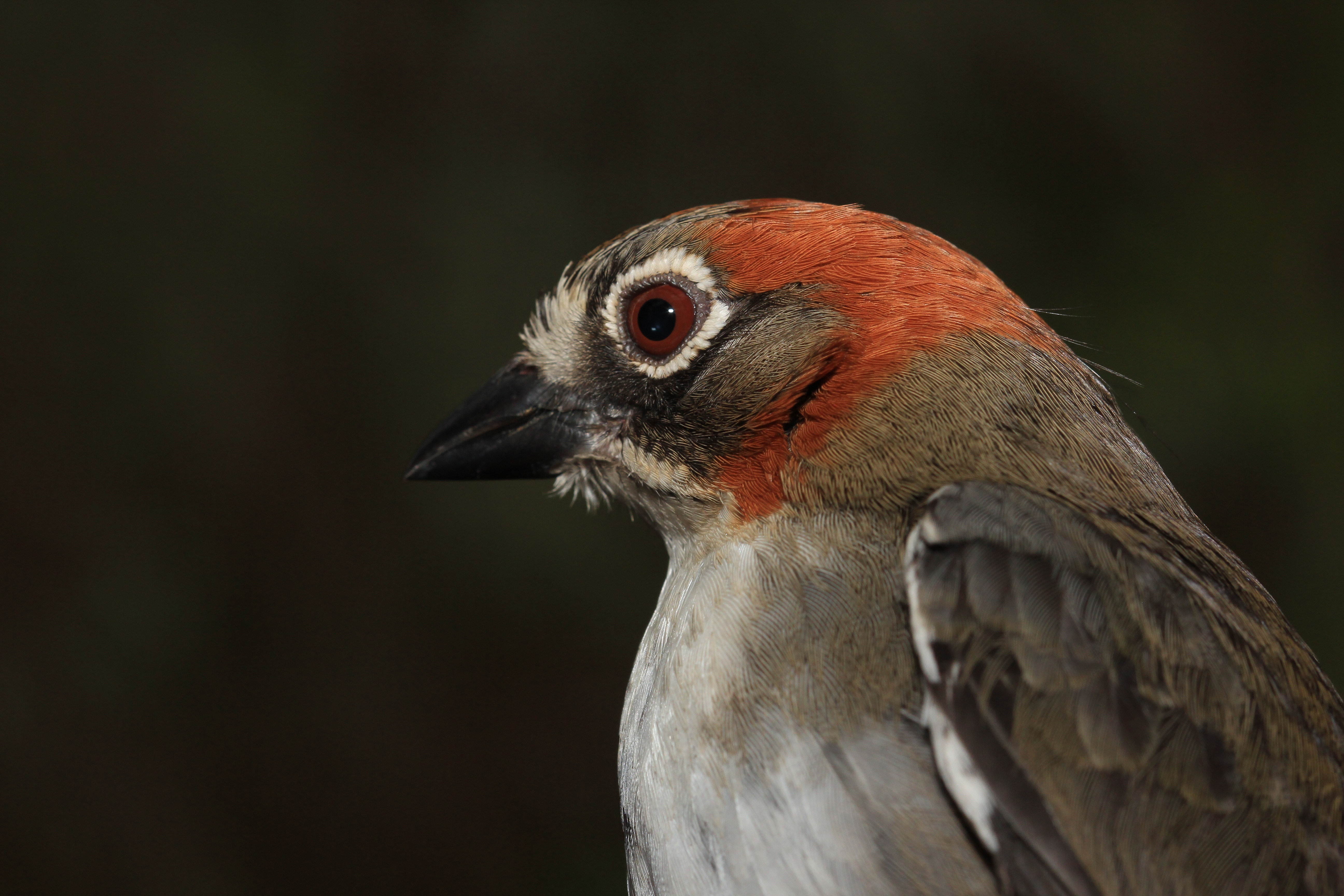 rascador